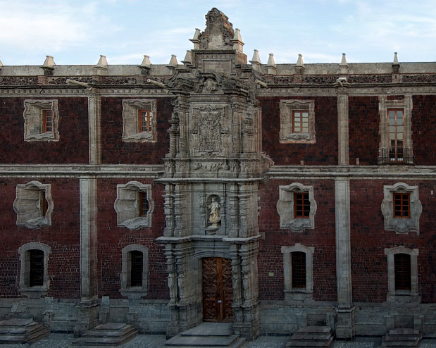 Fachada del patio chico del Antiguo Colegio de San Ildefonso, una de las edificaciones coloniales más importantes del Centro Histórico de la Ciudad de México y sede del Museo de la Luz, de la Dirección General de Divulgación de la Ciencia, de la UNAM.